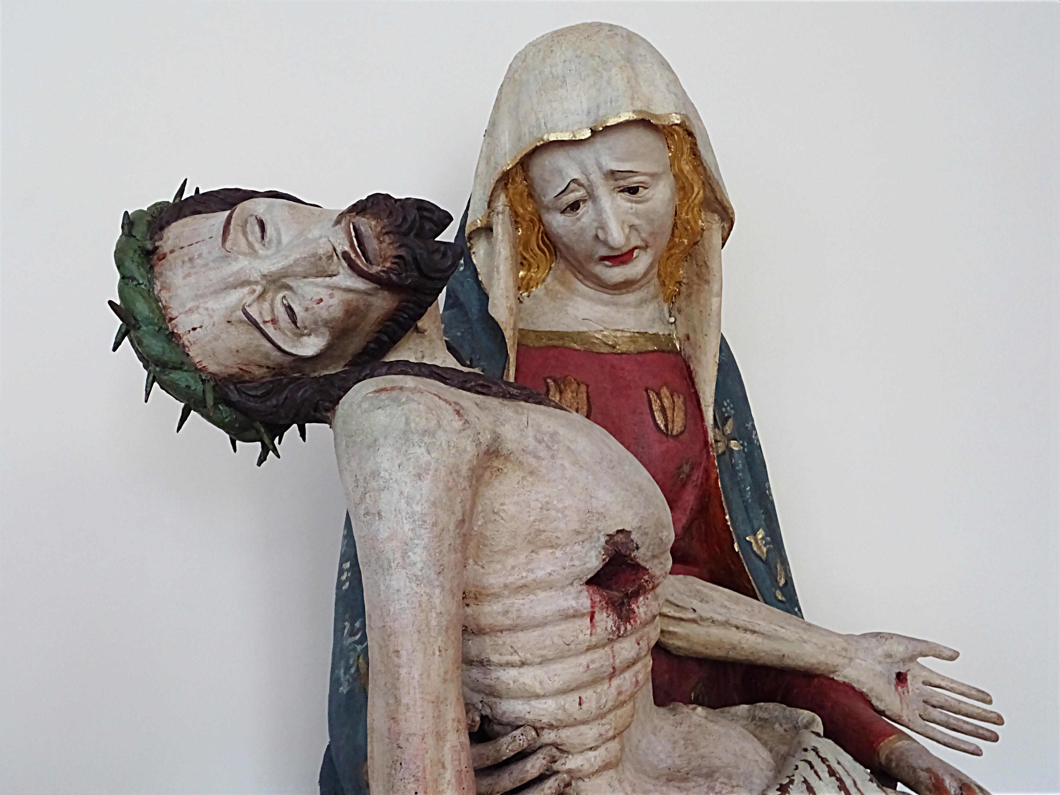 Schmerzensmutter mit dem Leichnam des vom Kreuz abgenommenen Jesus Christus, mittelalterliche Pietá aus der Zeit der Magdalenerinnen (1340) im Ursulinenkloster Erfurt